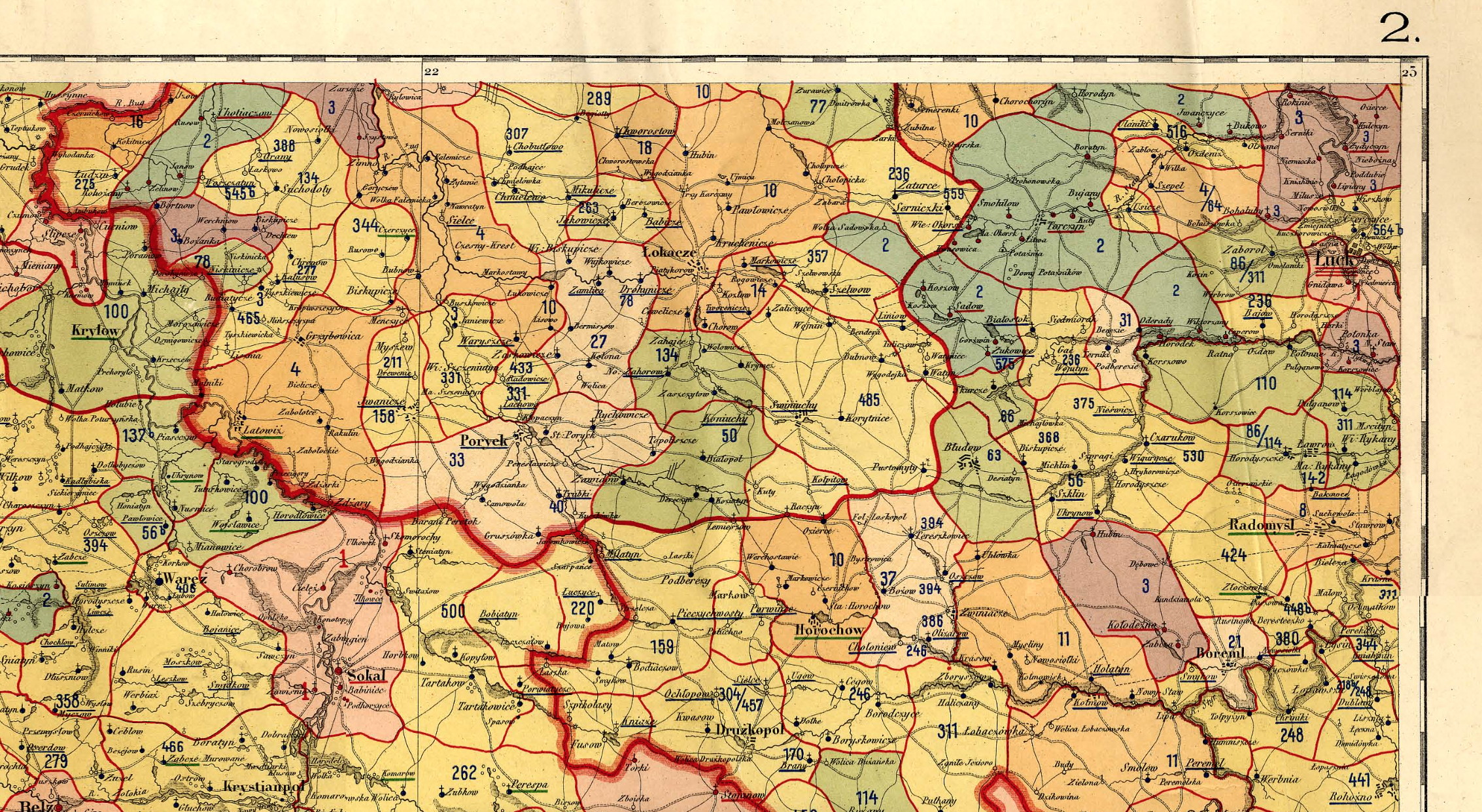 Atlas historyczny Rzeczypospolitej Polskiej. Epoka przełomu z wieku XVI-go na XVII-sty. — Dział II-gi: «Ziemie ruskie» Rzeczypospolitej / Opracował i wydał Aleksander Jabłonowski. — Warszawa; Wiedeń, 1899—1904, (Карта № 2, Владимирский повет)